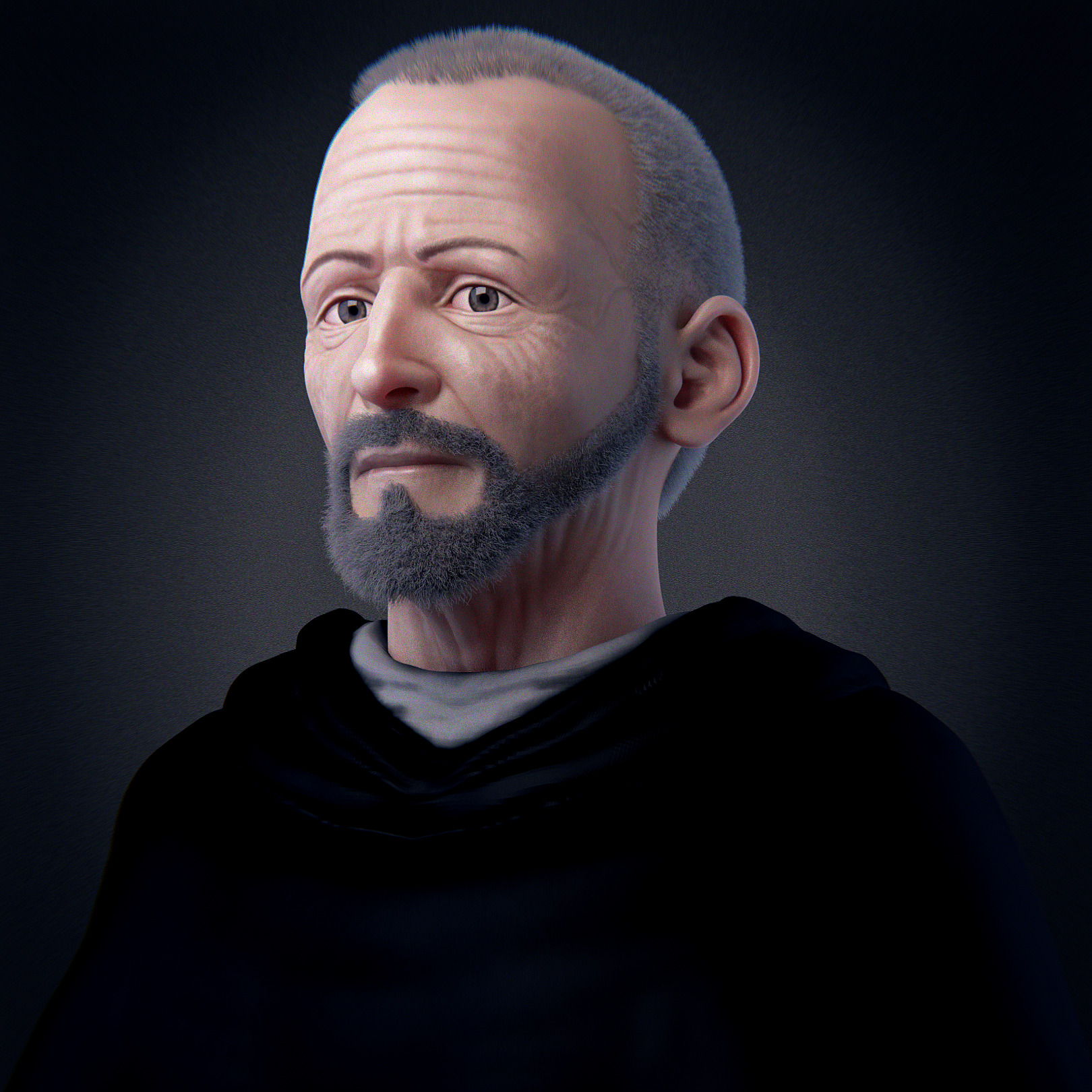 Reconstrução facial de São João Macias. Projeto Santos Peruanos. Ebrafol - Equipe Brasileira de Antropologia Forense e Odontologia Legal, Convento Santo Domingo, Faculdade FASIPE, Paróquia Santa Rosa de Lima, Spolfoc - Sociedad Peruana de Odontología Legal Forense y Criminalística, Universidad Inca Garsilaso de la Vega, Universidad San Martín de Porres.